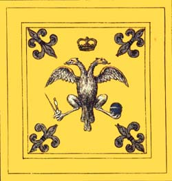 Bandiera della magistratura di San Michele del Gioco del Ponte di Pisa